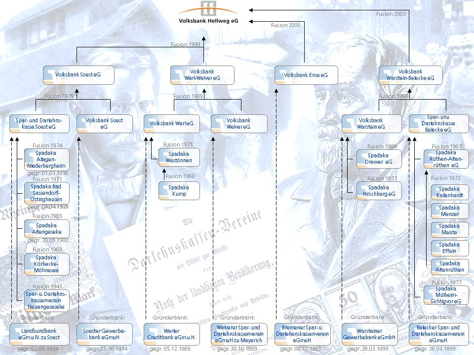 Die Historie der Volksbank Hellweg im Überblick